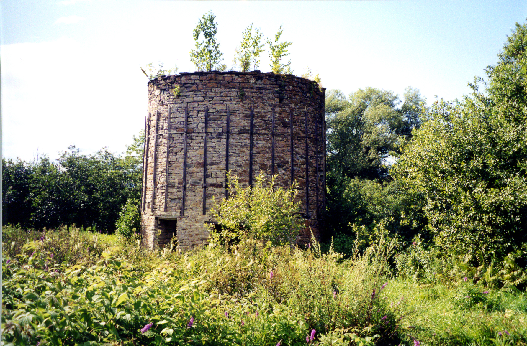 Moulin à vent de Sainte-Famille , aussi connu sous le nom de Moulin Poulin, situé à l'Île d'Orléans (Capitale nationale, Québec). Moulin à farine.